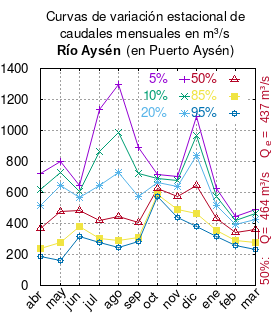 Curvas de variación estacional del río Aysén en Puerto Aysén. # Dirección General de Aguas # Diagnóstico y clasificación de los cursos y cuerpos de agua según objetivos de calidad. Cuenca del río Aysén. # Santiago de Chile # Ministerio de Obras Públicas (Chile) # 2004 # url: # urlarchivo: # Tabla 4.11: Estación Aysén en Puerto Aysén pág. 60 mes 5% 10% 20% 50% 85% 95% abr 722.27 621.41 517.92 365.63 238.12 185.09 may 798.33 728.03 642.88 480.14 279.69 161.95 jun 644.84 608.76 565.05 481.51 378.62 318.19 jul 1132.94 865.97 647.15 419.10 305.34 276.26 ago 1293.84 988.90 729.71 444.28 289.51 246.65 sep 892.64 721.71 573.43 405.03 309.35 281.65 oct 718.46 692.80 666.05 625.64 589.74 573.46 nov 705.68 676.12 640.31 571.88 487.59 438.08 dic 1087.54 968.30 841.24 642.93 461.69 380.08 ene 628.71 573.93 516.82 430.56 353.94 319.17 feb 446.84 421.55 393.13 342.94 287.40 257.81 mar 490.47 461.73 426.91 360.37 278.41 230.27 This plot was created with Gnuplot.